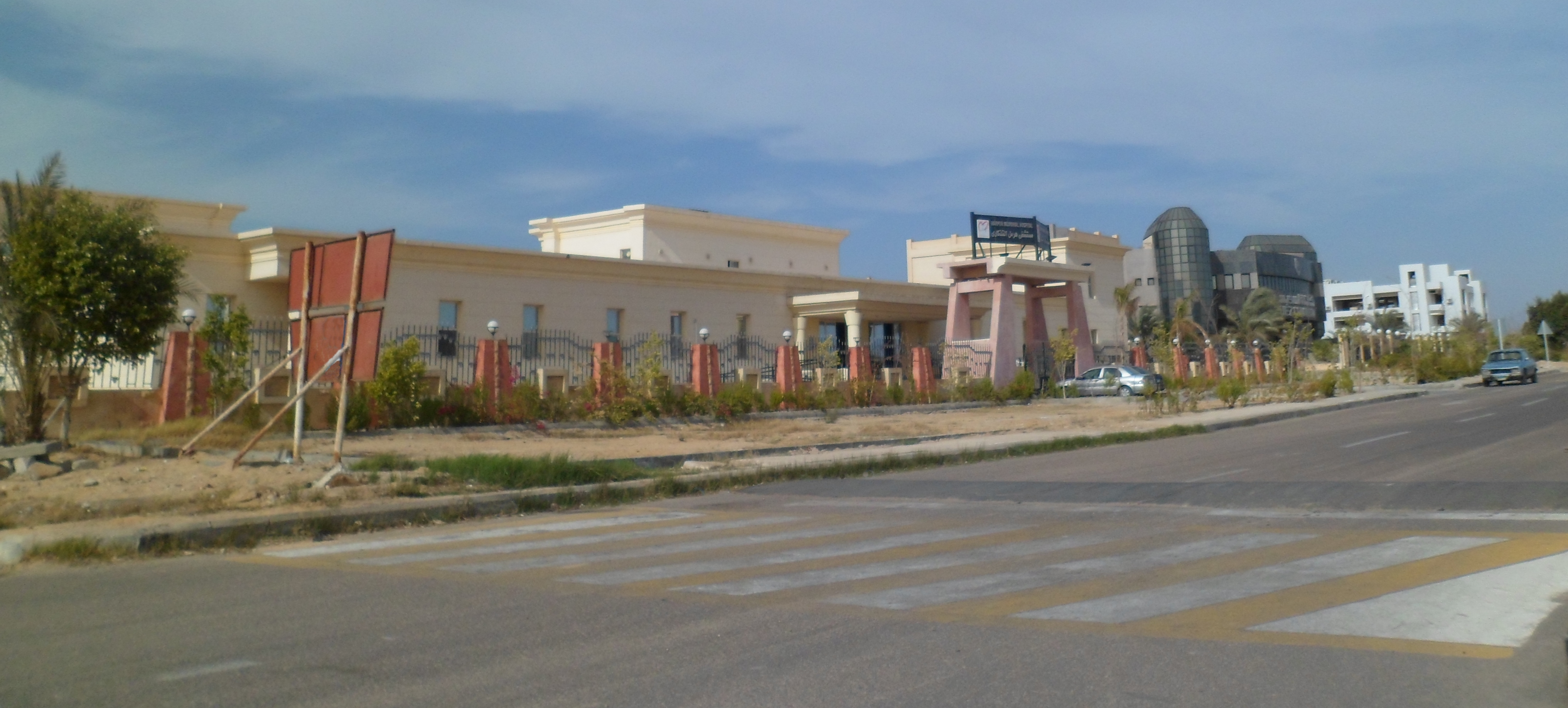 مستشفى هرمل التذكاري، مدينة السادات، مصر.